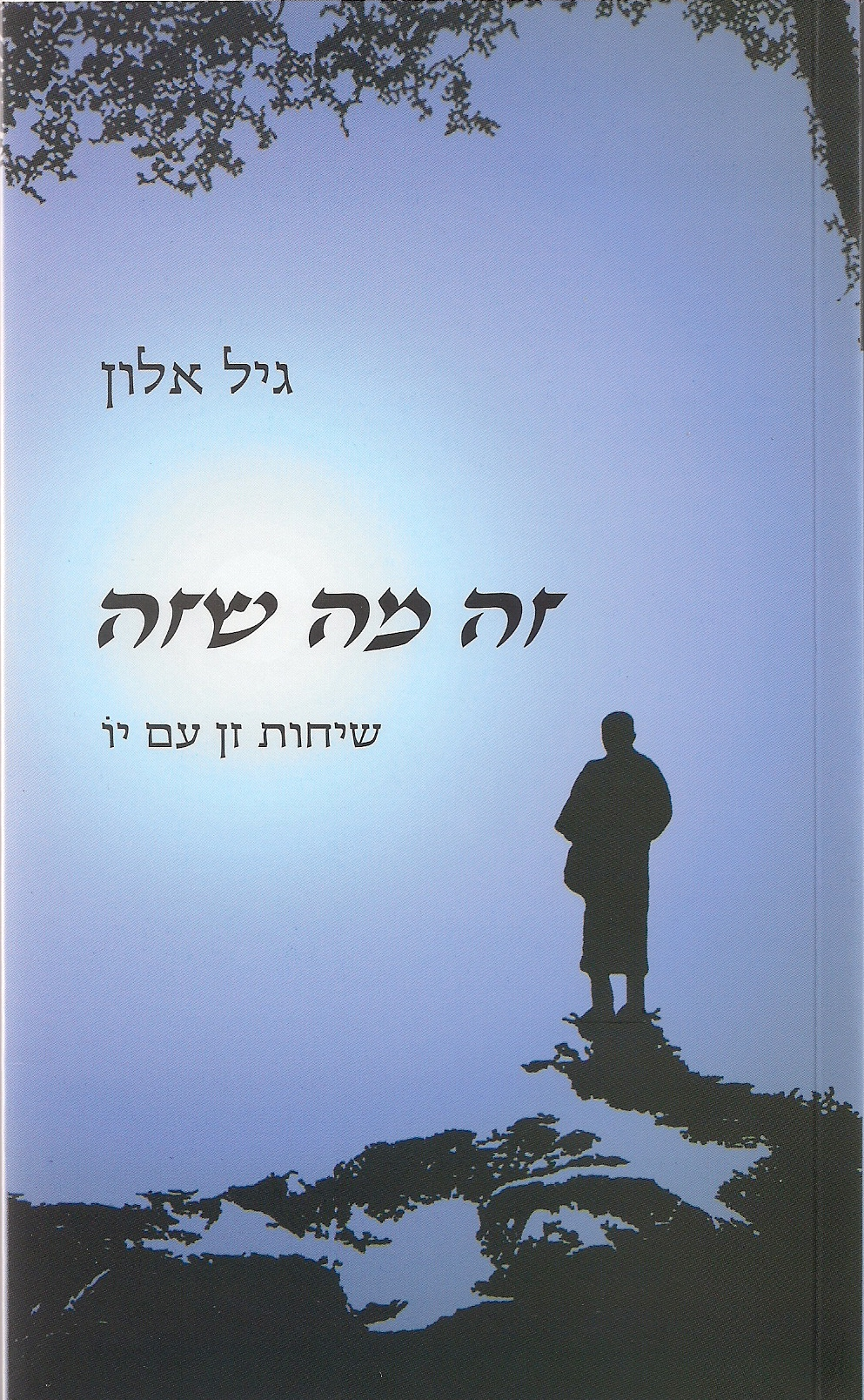 כריכת בספר "זה מה שזה" - שיחות זן עם יו